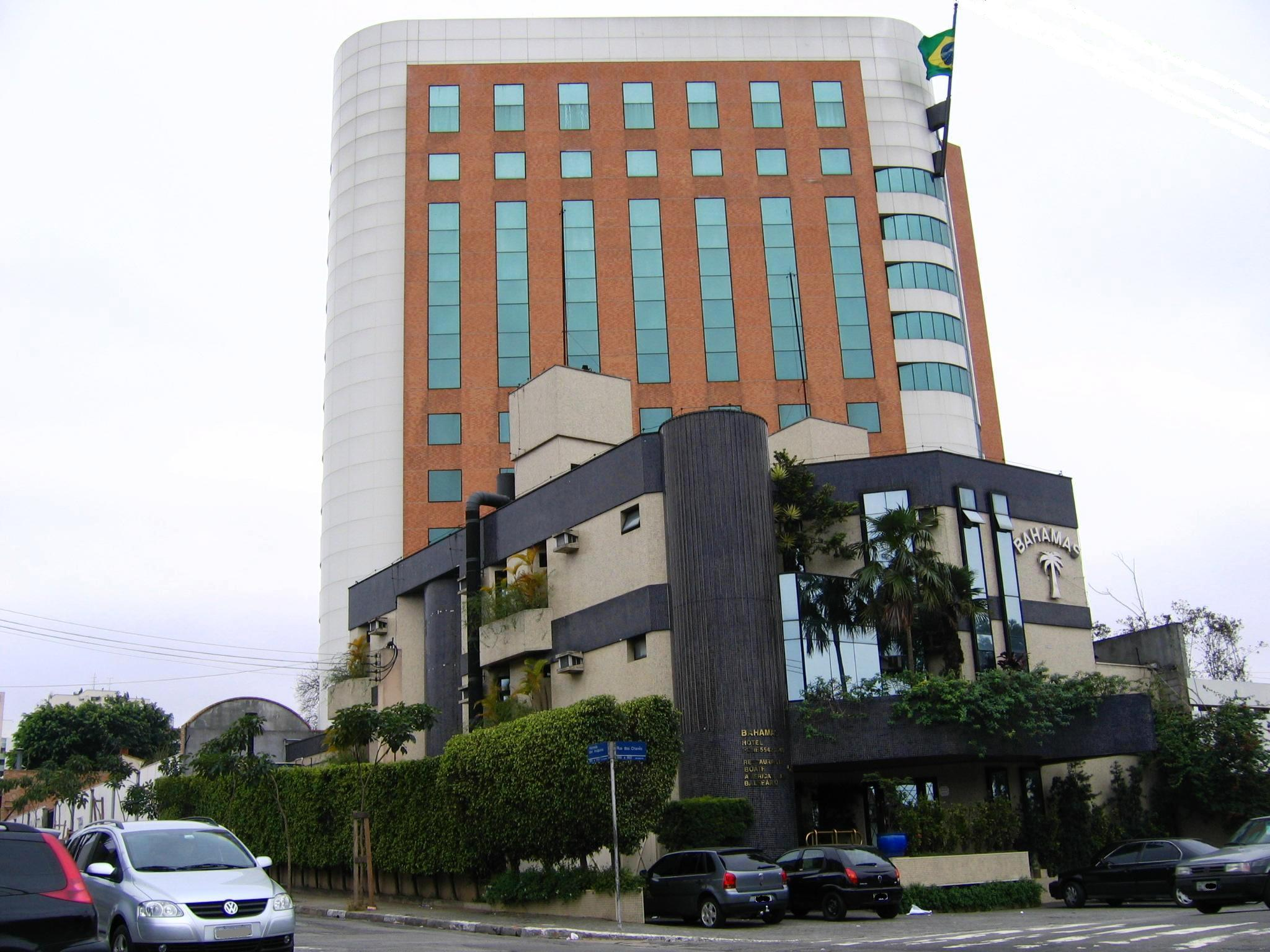 Prédio pertencente a Oscar Maroni Filho que a prefeitura pretende demolir, devido a interferência que causa na aproximação das aeronaves ao Aeroporto de São Paulo (Carece de fontes)